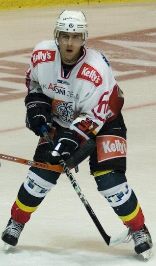 Spieler des HK Jesenice im Spiel gegen den EC VSV. * Sonstiges: Zustimmung zur Veröffentlichung unter CC BY SA wurde per Mail erteilt. --Zaxxon 19:47, 1. Nov. 2006 (CET)